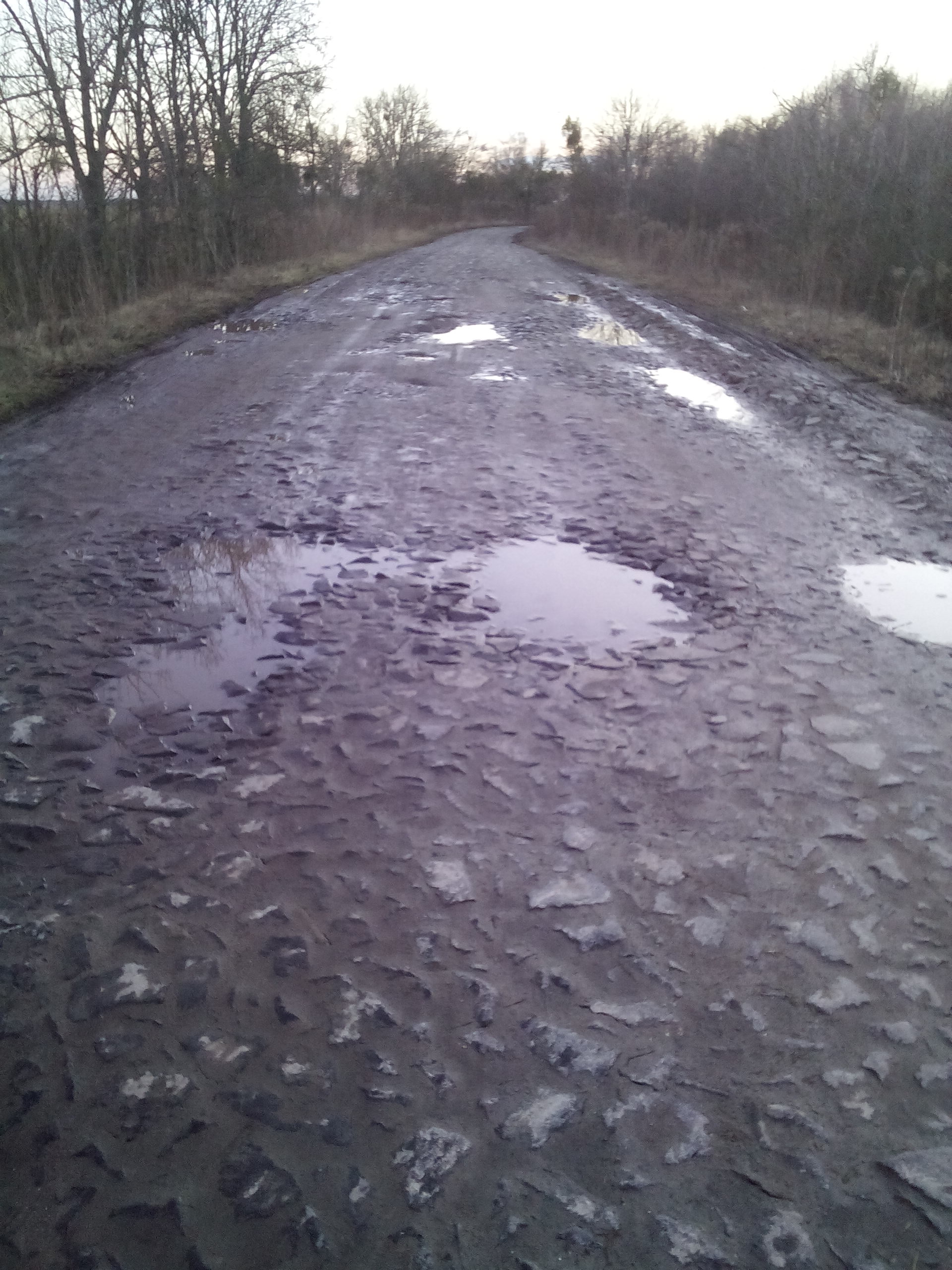 Фото автодороги Т 0303 (Луцьк-Радомишль-Демидівка-Дубно) поблизу села Вовковиї (Демидівський район) (зі сторони м. Дубно)